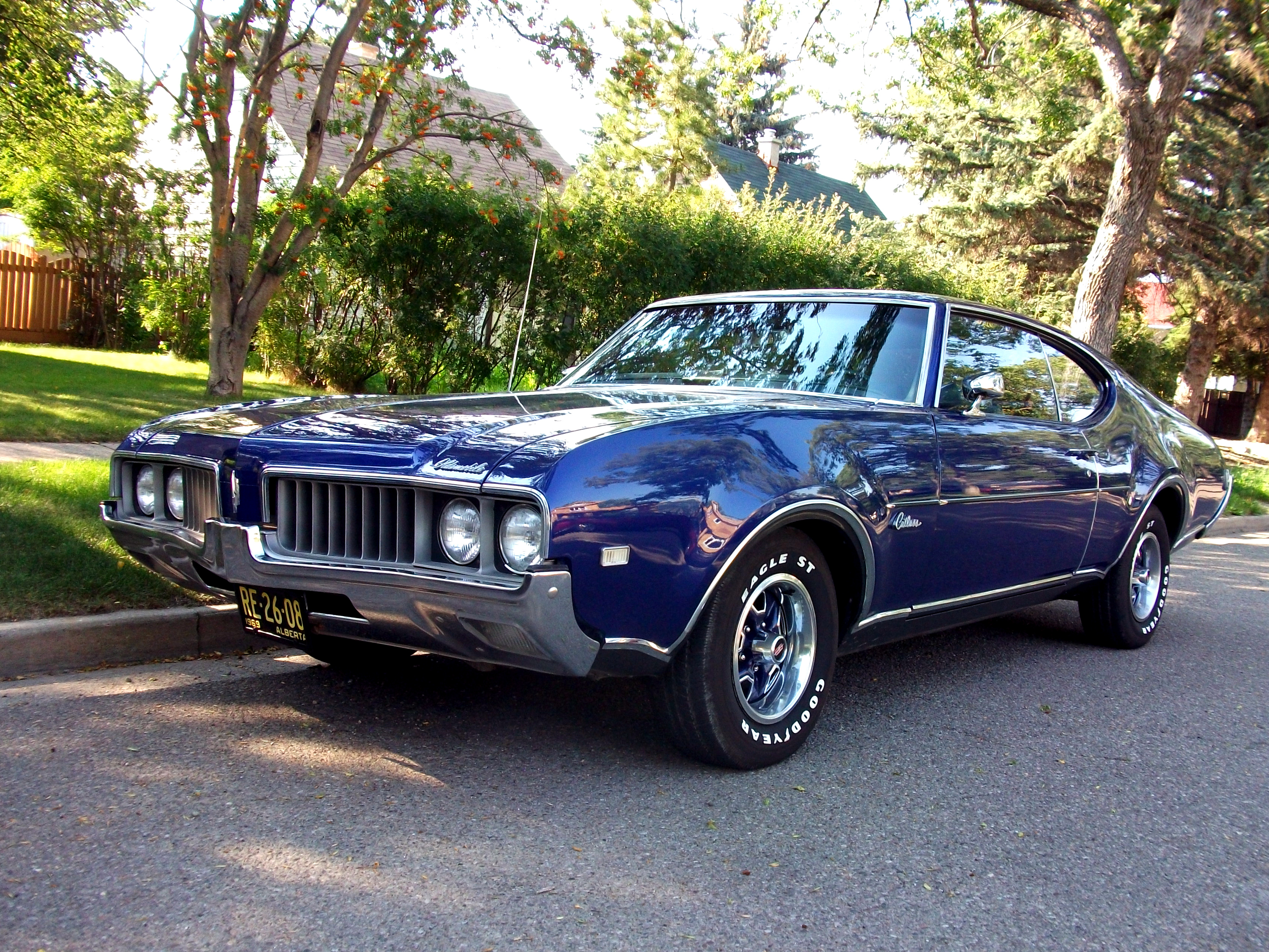 1969 Oldsmobile Cutlass